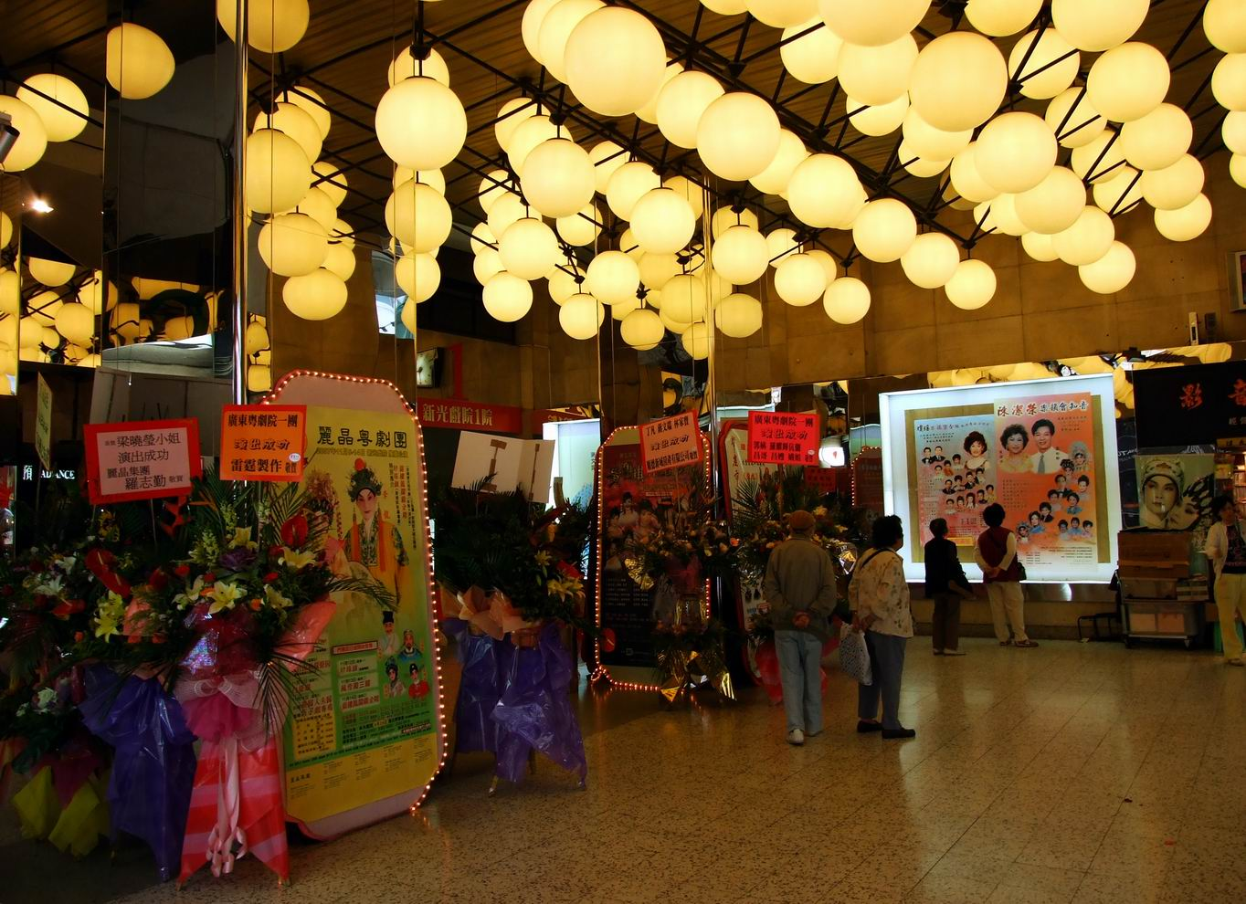 新光戲院大堂